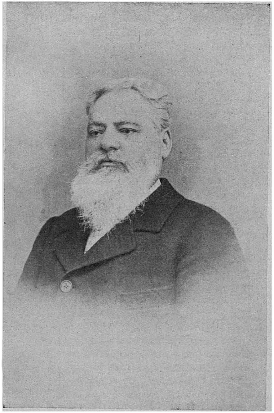 1860 - Gheorghe (Ghiţă) Ioan, tatăl lui Take Ionescu (România)